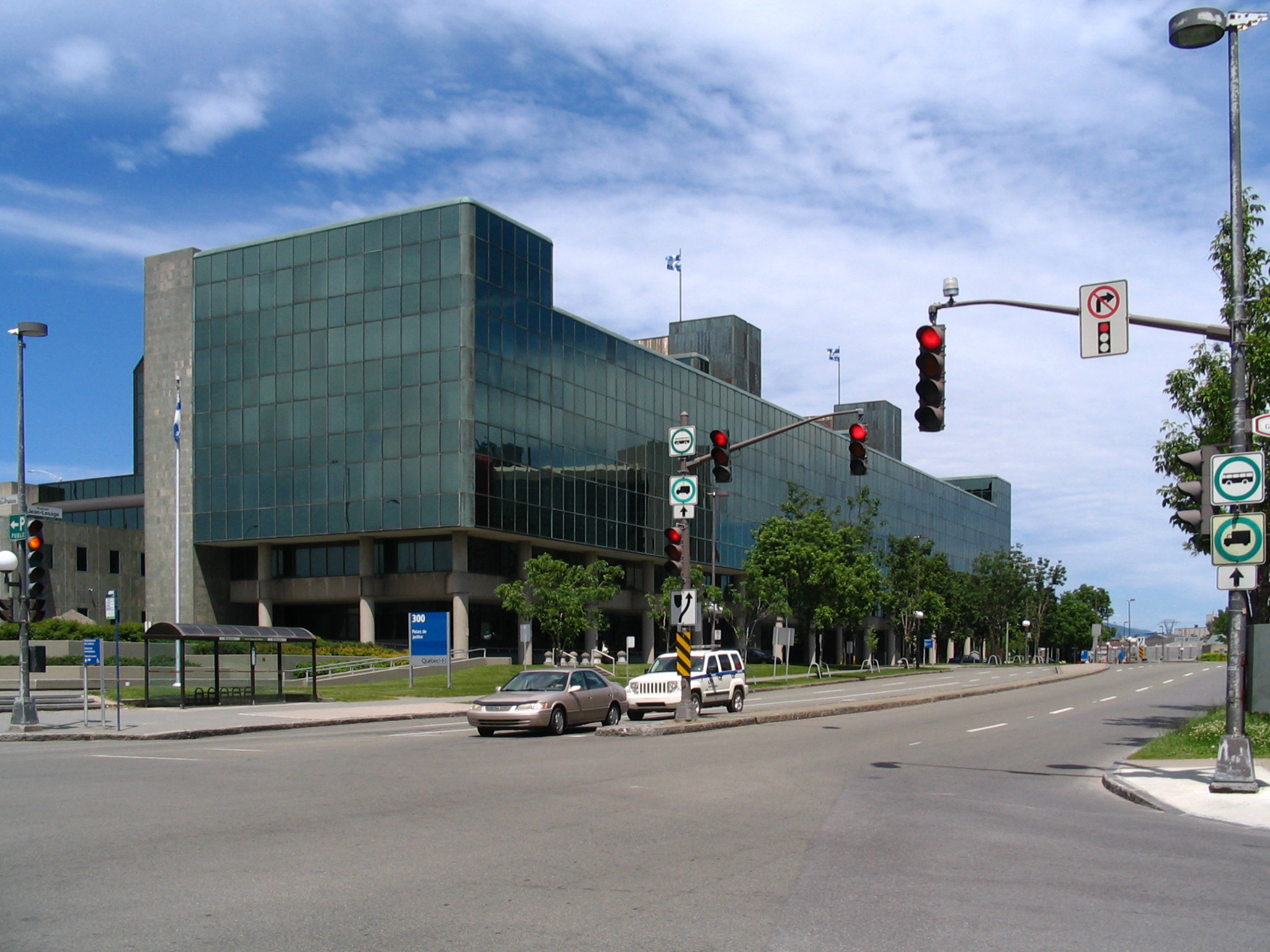 Le nouveau Palais de Justice de Québec, construit dans les années 1980 à la limite du quartier Saint-Roch, dans l'arrondissement La Cité-Limoilou.